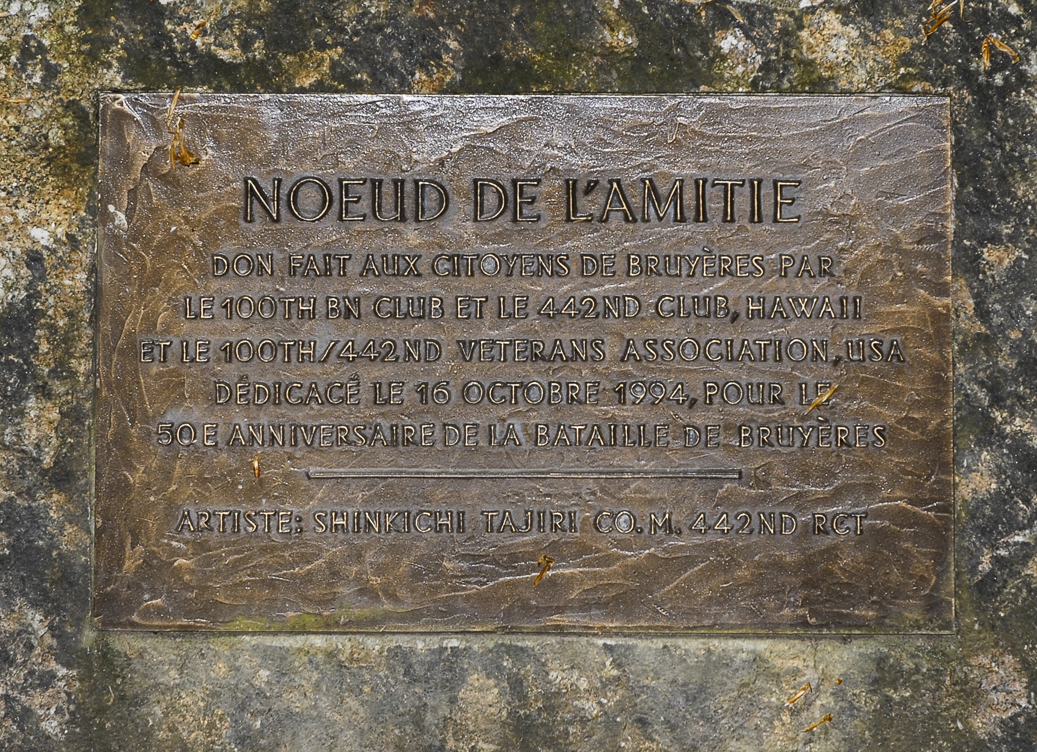 Bruyères dans les Vosges : plaque du Nœud de l'Amitié réalisé par le Professeur Shinkichi TAJIRI.